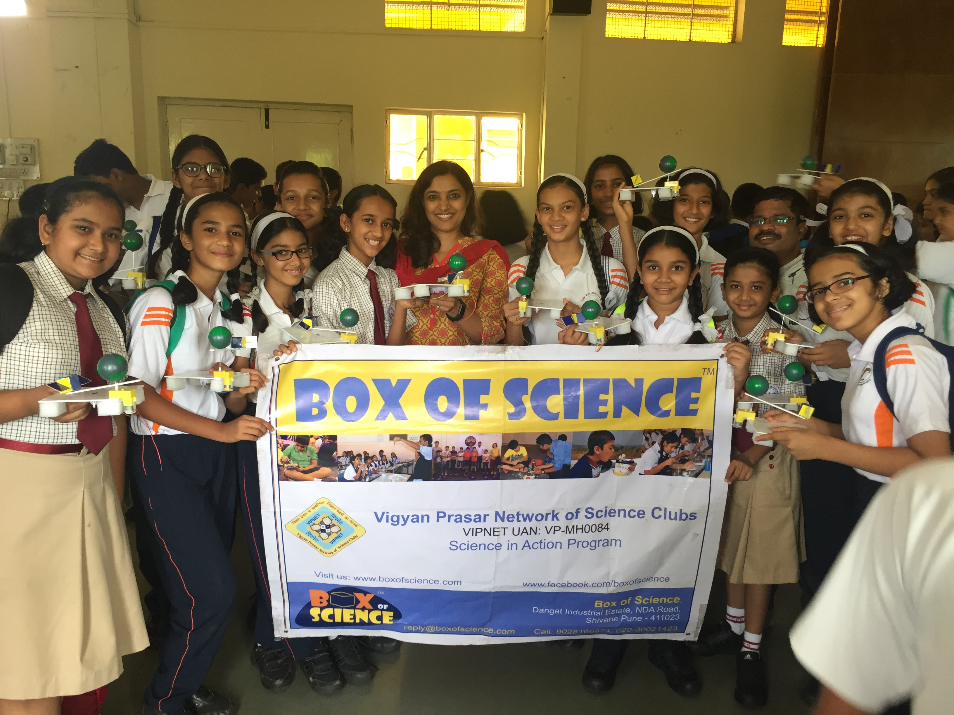 बॉक्स ऑफ सायन्स विज्ञान मंडळ